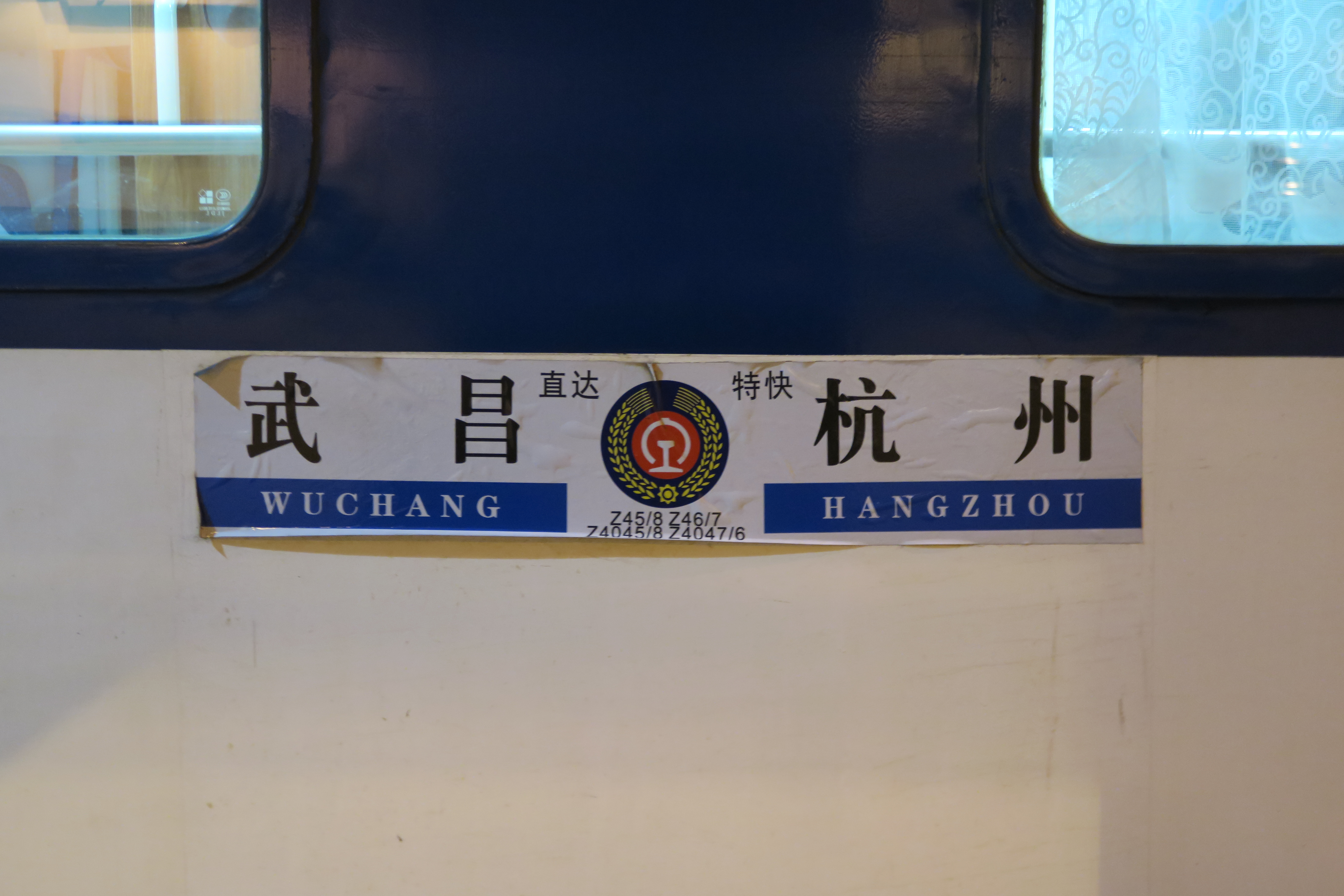 Z47次列车水纸